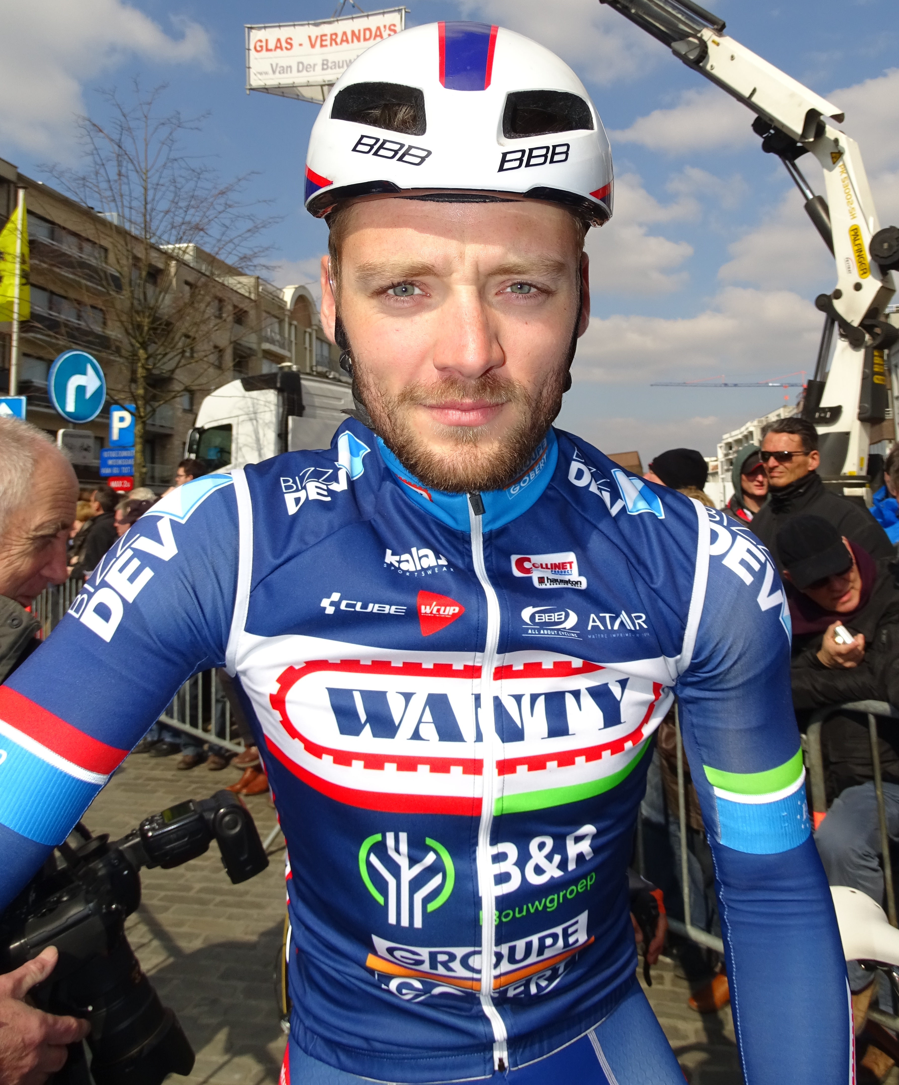 Reportage réalisé le mercredi 16 mars à l'occasion du départ de la Nokere Koerse 2016 à Deinze, Belgique.